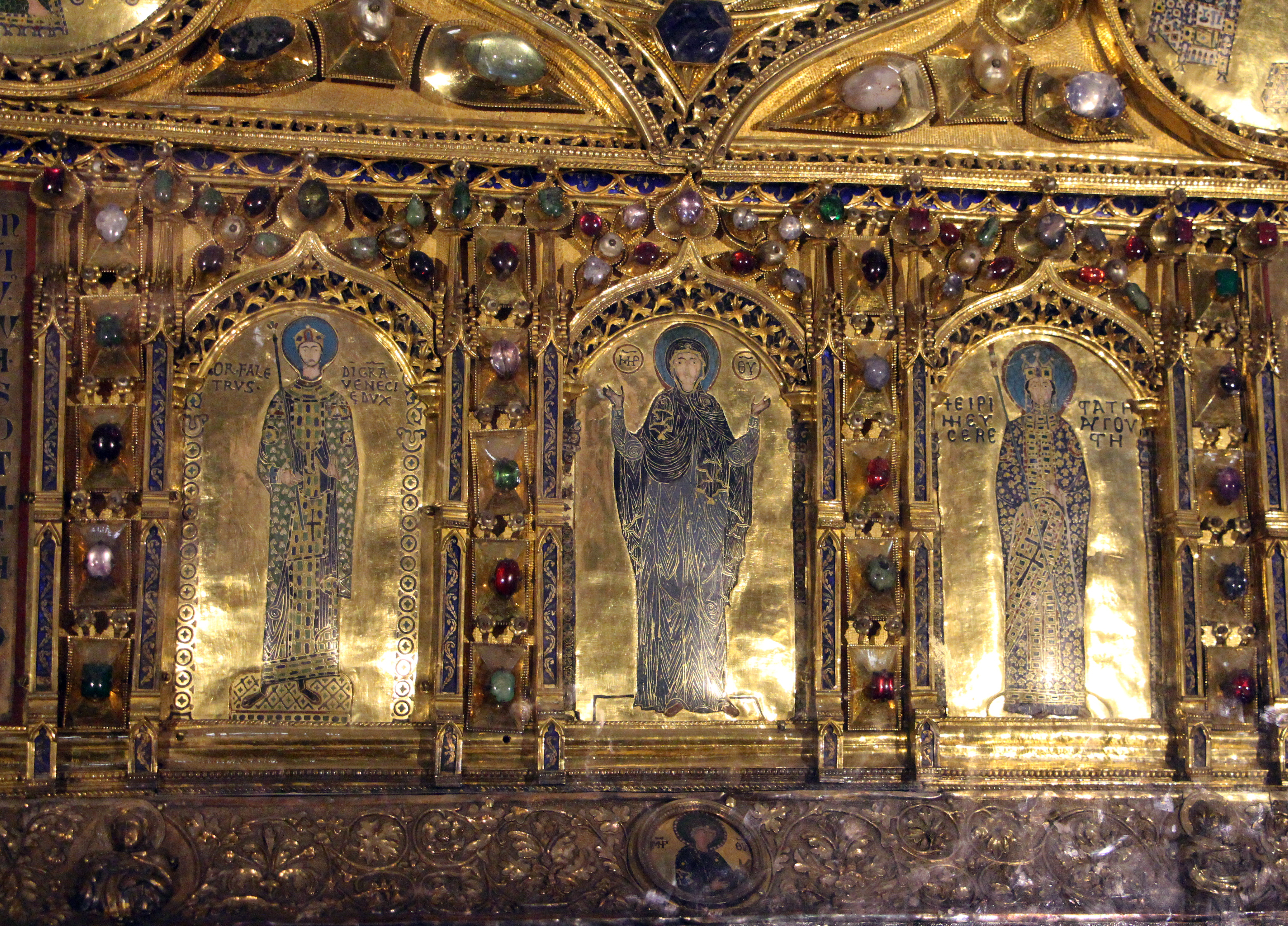 San Marco, Venezia